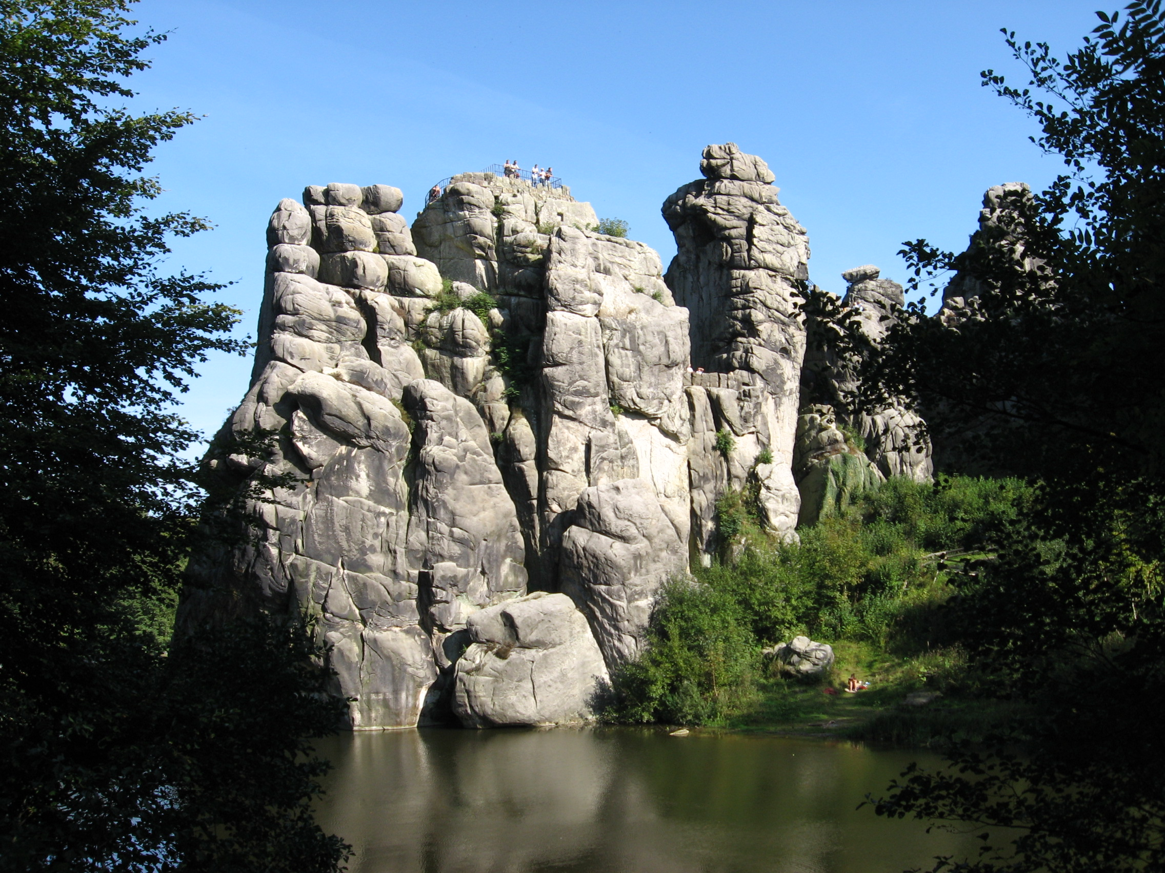 Gesamtansicht Externsteine aus Nordost